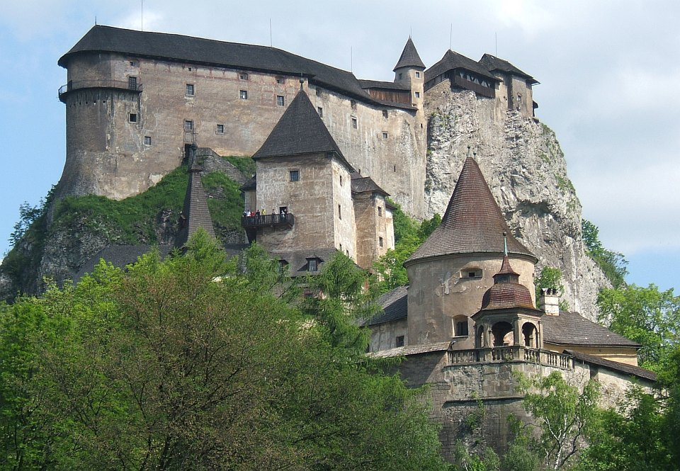 Orava - hrad